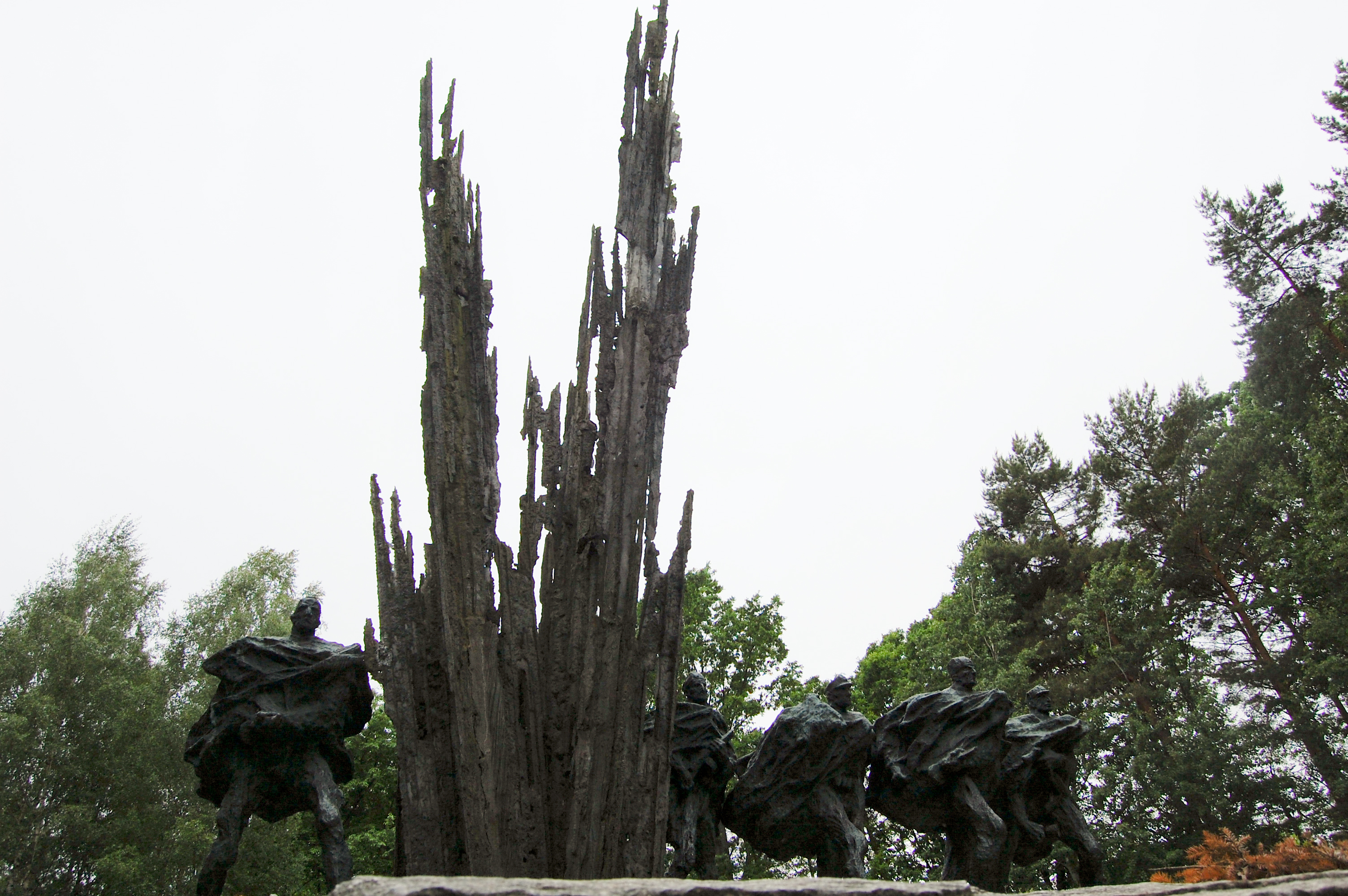 Porytowe Wzgórze - miejsce jednej z największych bitew partyzanckich okresu II wojny światowej. Był to finał niemieckiej akcji pacyfikacyjnej Sturmwind I (Wicher I), która rozegrała się w dniach 9-14 czerwca 1944 r. Do akcji przeciw partyzantom skierowano siły liczące ok. 30 tysięcy bardzo dobrze wyszkolonych żołnierzy (w tym 3 dywizje Wehrmachtu i samoloty 4 Floty Powietrznej). Zgrupowanie partyzanckie liczyło ok. 3000 ludzi. Wśród nich było 100 żołnierzy z AK i BCh, 700 z AL i 1900 partyzantów radzieckich. Po zaciętych walkach partyzanci wycofali się nocą z 14/15 czerwca w dalsze rejony Puszczy Solskiej. Zgrupowanie zachowało przy tym pełną zdolność bojową. Po wojnie na Porytowym Wzgórzu utworzono cmentarz partyzancki, odsłonięto także pomnik dłuta Bronisława Chromego. Przedstawia on 5 biegnących partyzantów, pomiędzy którymi wybucha granat. Obok krzyż i głaz pamięci żołnierzy AK i BCh.